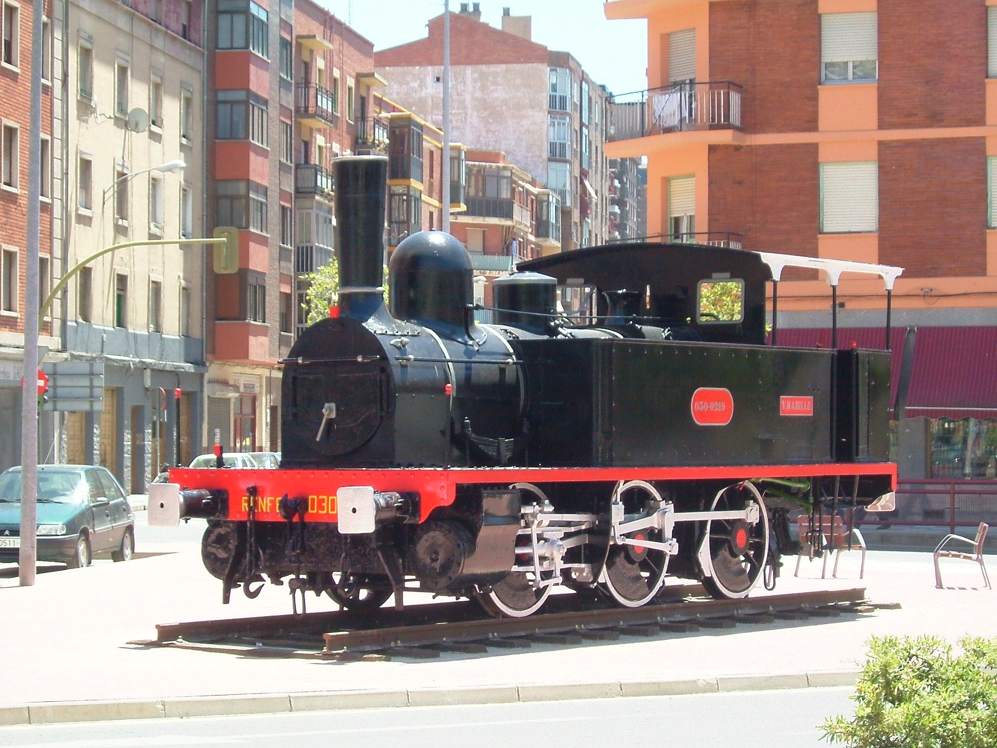 Locomotora antigua en Miranda de Ebro